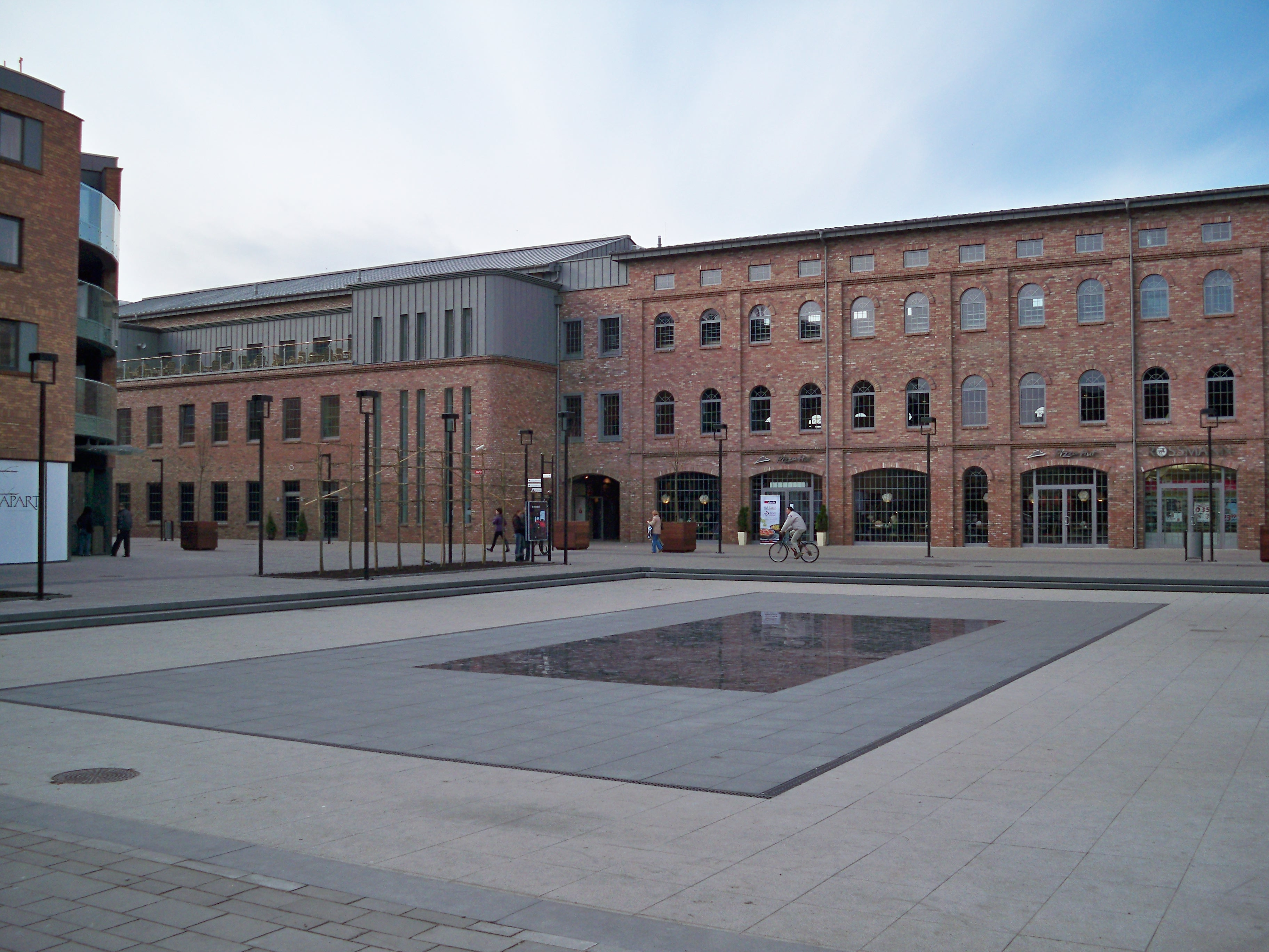 Wzorcownia Włocławek 2009 r.